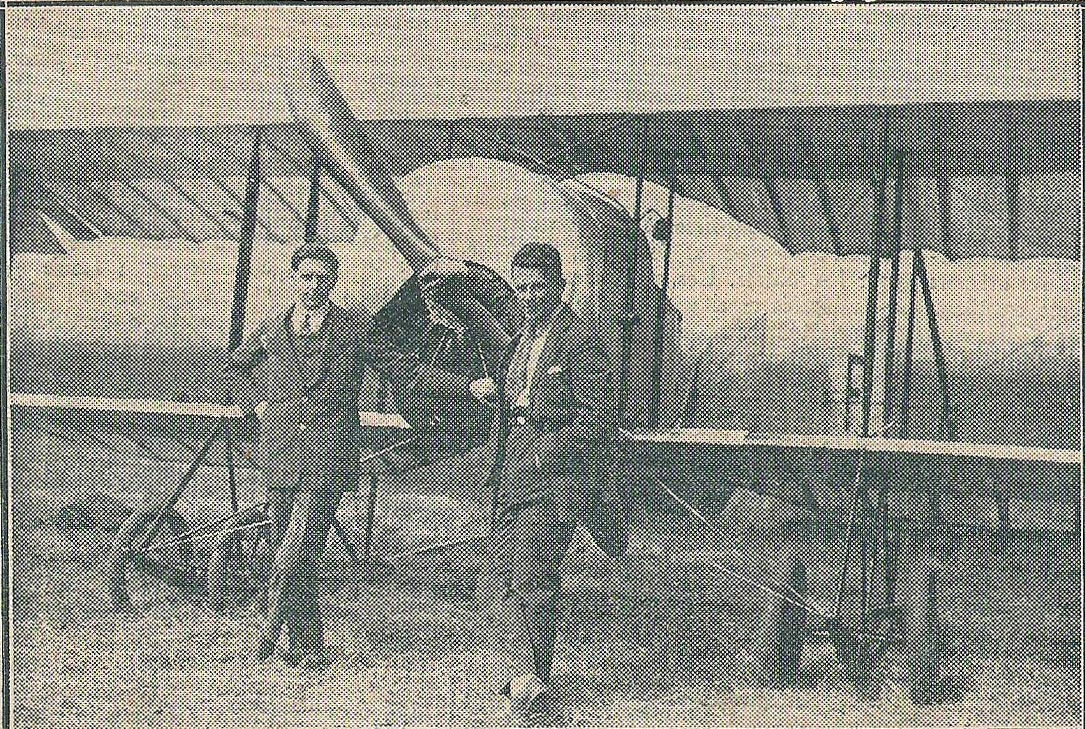 Christian_Moench_pilote et Pierre_Gouin mécanicien lors du meeting d'aviation de Nancy ; juin 1926 .